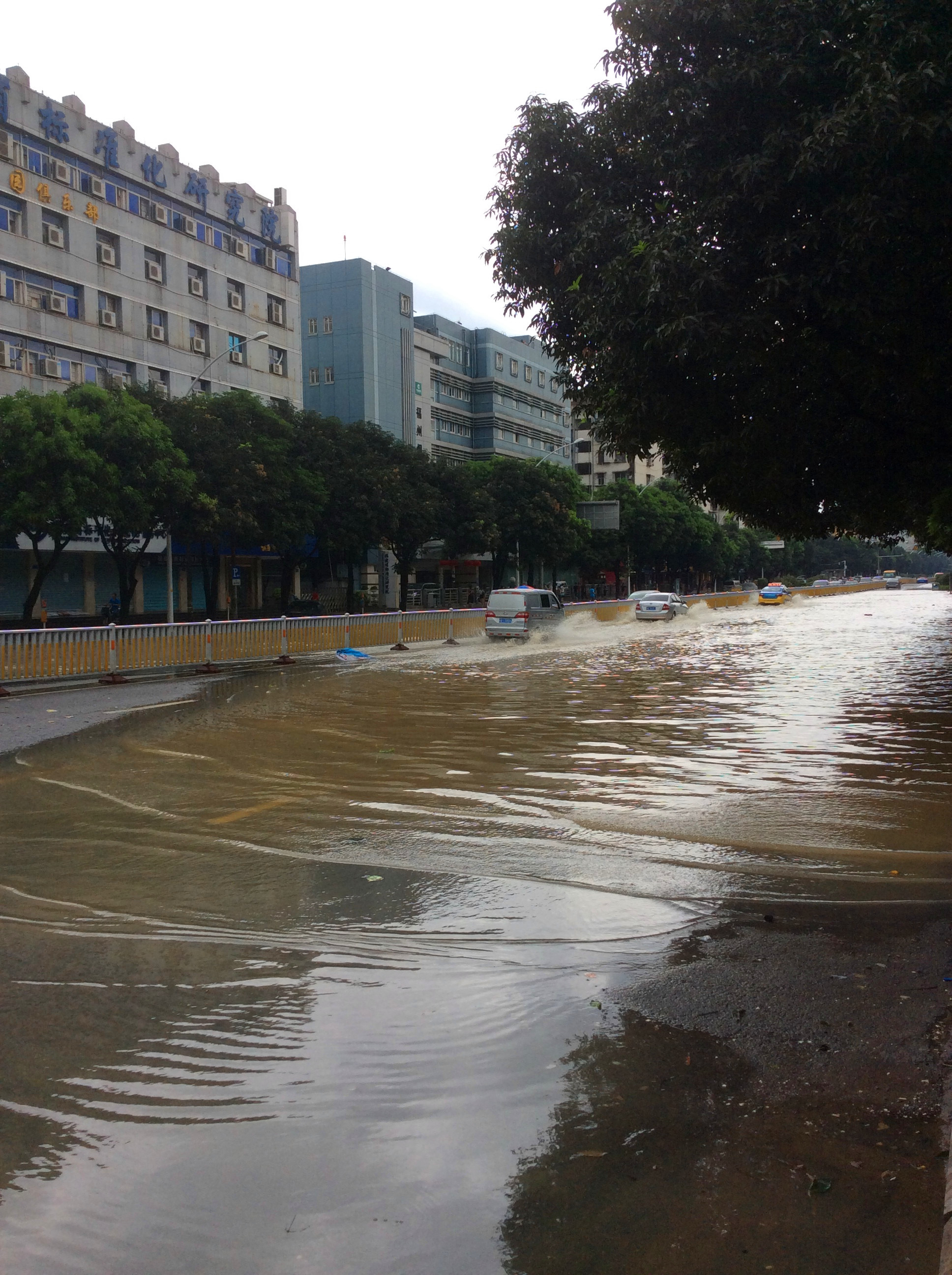 台风麦德姆导致福州市区街道积水，图为福州晋安区六一北路积水图